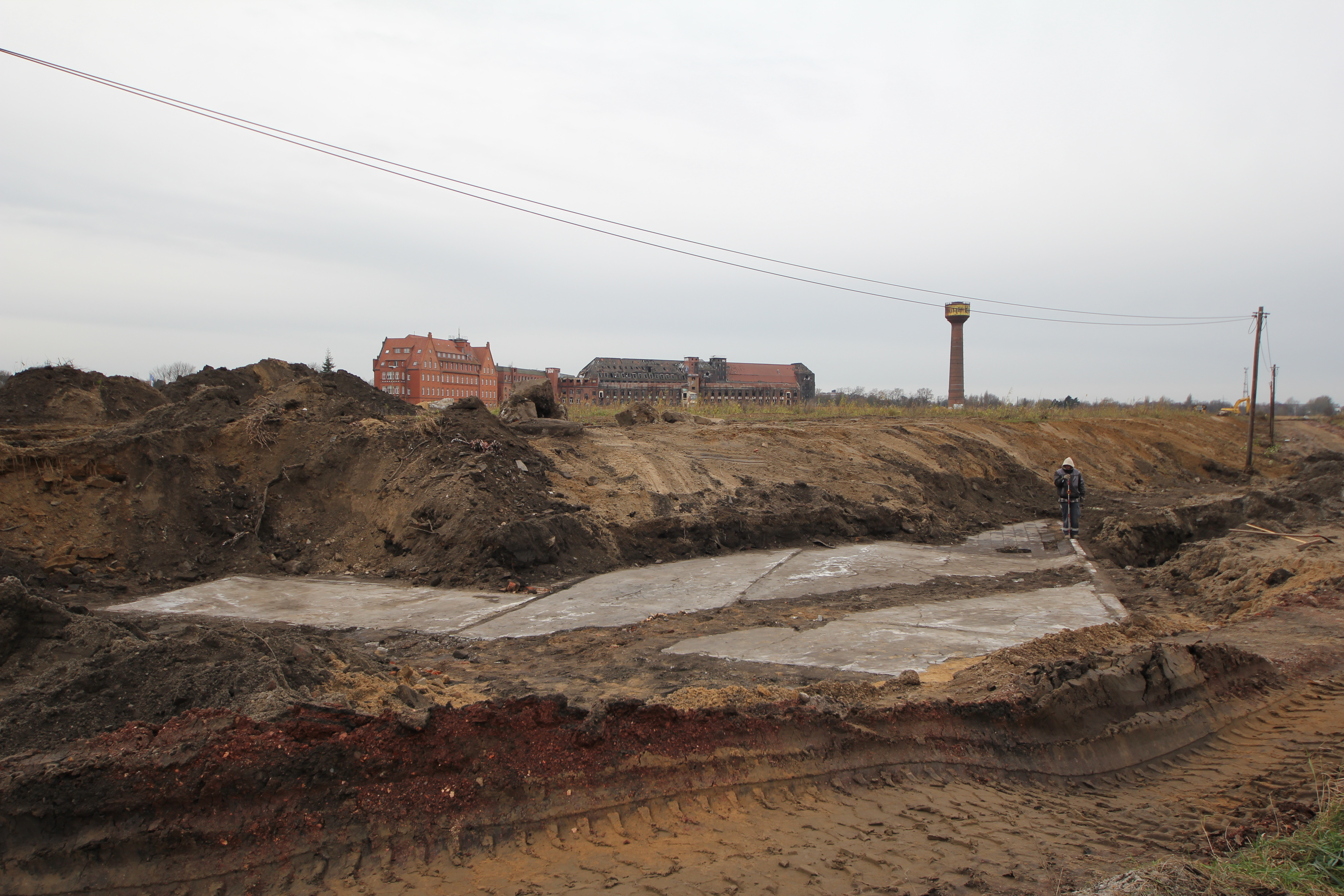 Bei einer archäologischen Grabung wurde ein Teil eines Bodens einer Häftlingsbaracke des KZ-Außenlager Limmer freigelegt.